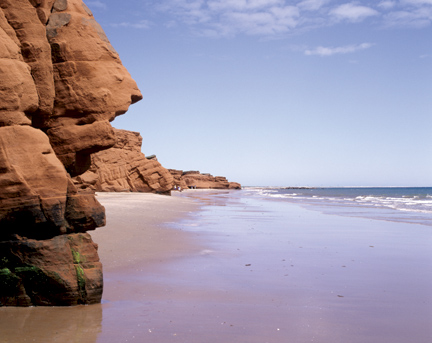 Plage et falaises, Plage de la Dune du Sud,Îles-de-la-Madeleine / Beach and cliffs of Magdalen Island (Québec, Canada)